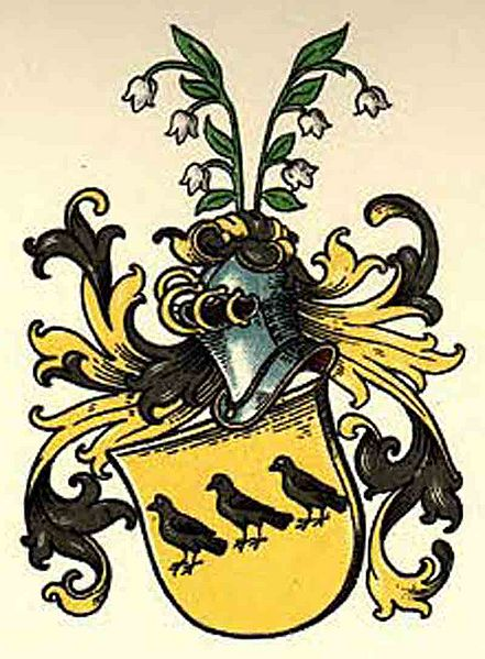 Wappen der westfälischen Adelsfamilie von Gysenberg (auch Giesenberg)